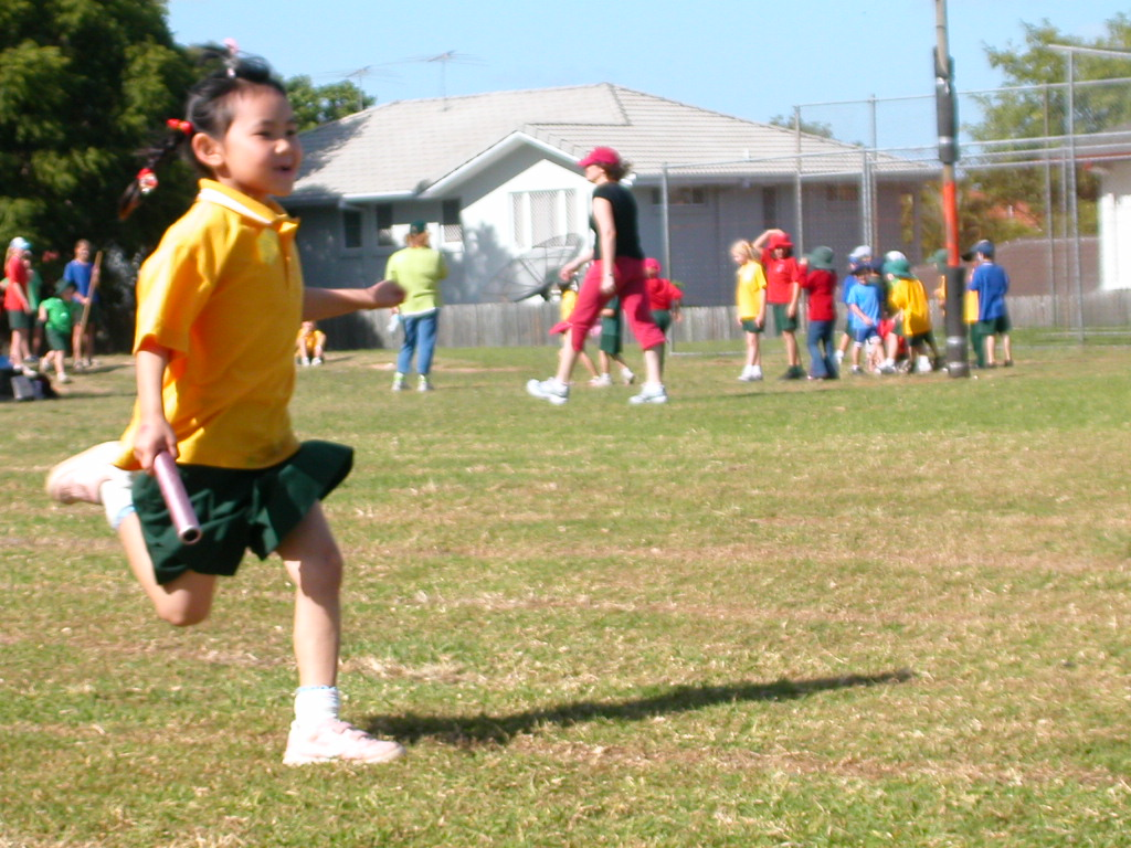 RelayDSCN3008